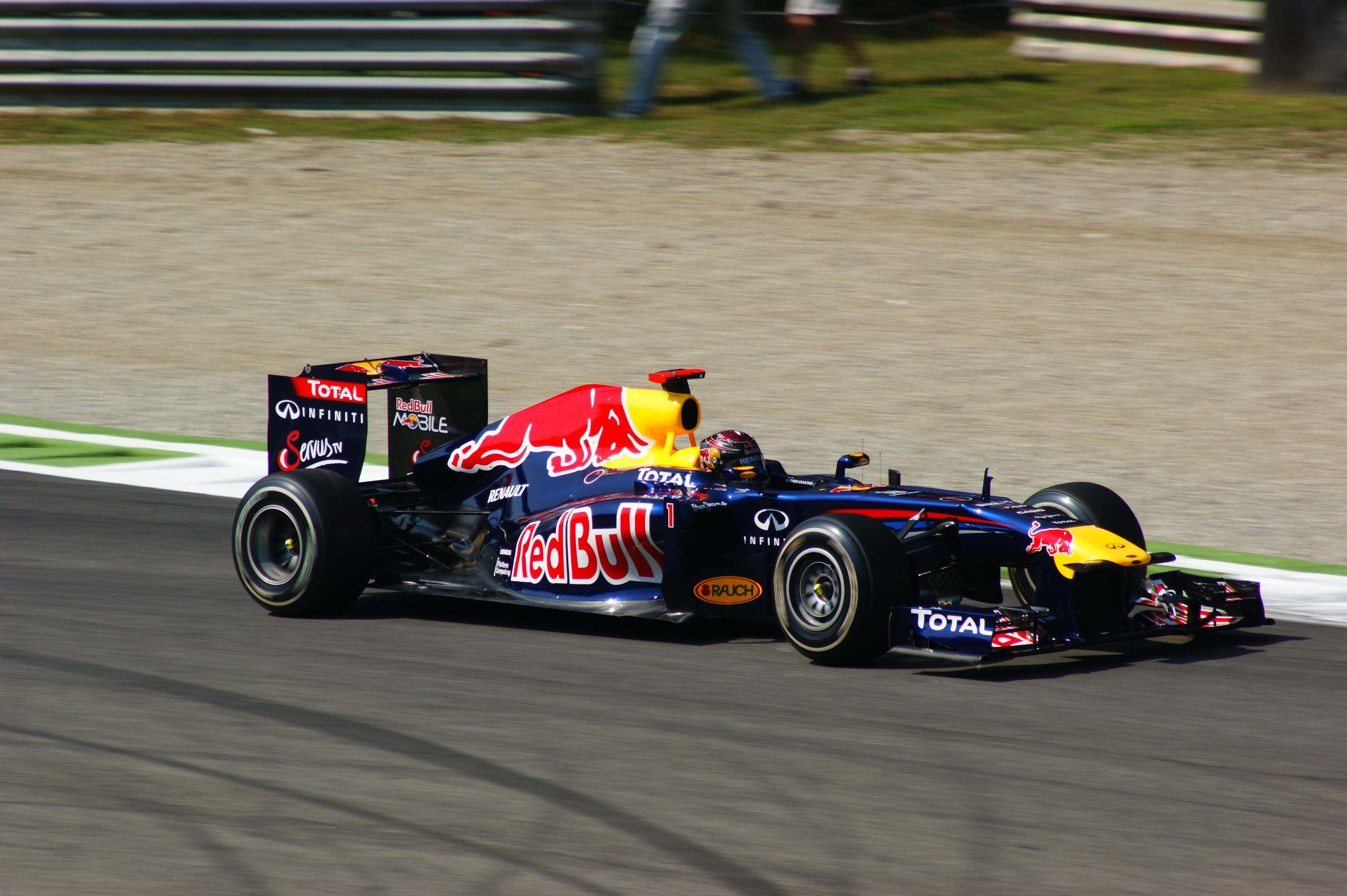 Sebastian Vettel alla variante della roggia Monza 2011